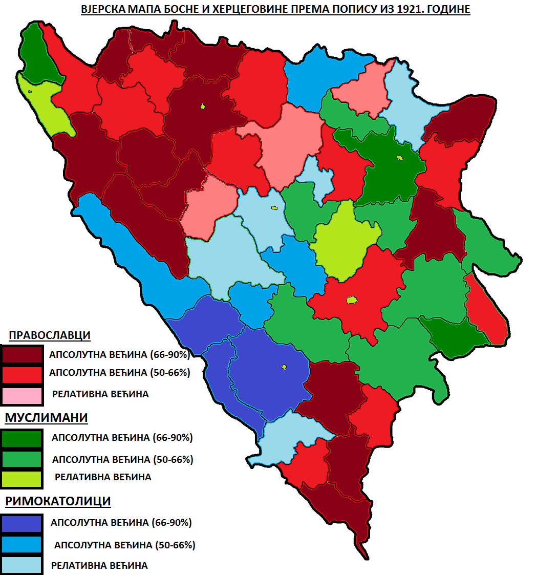 Вјерска мапа Босне и Херцеговине према попису из 1921. године